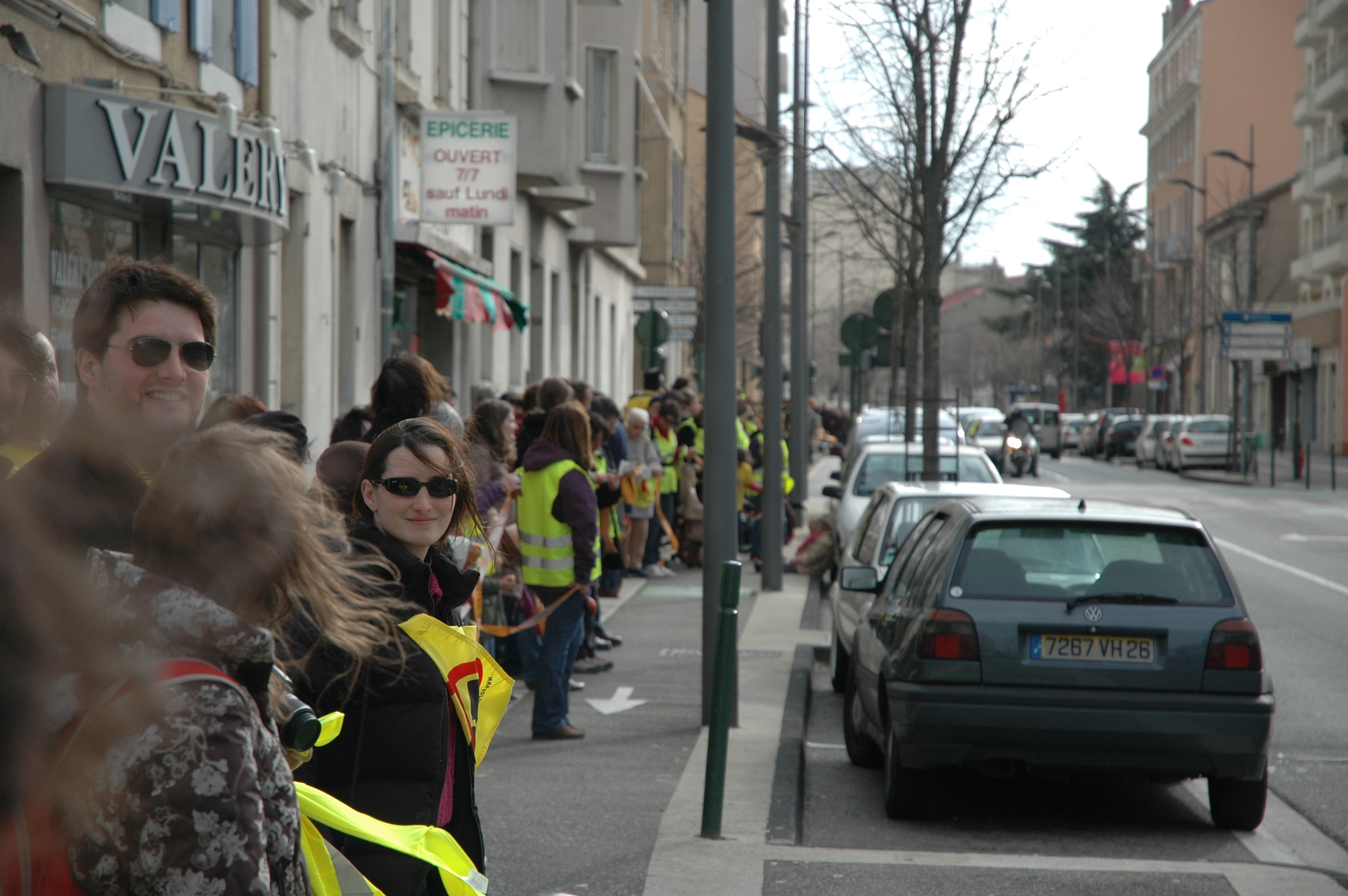 Chaîne humaine de Lyon à Avignon contre l'énergie nucléaire le 11 mars 2012 à Valence